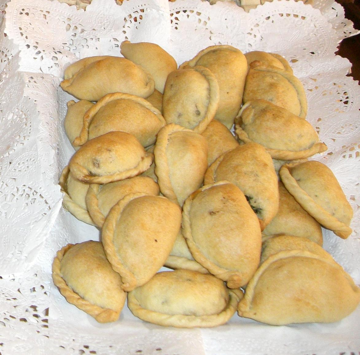 Cocarrois